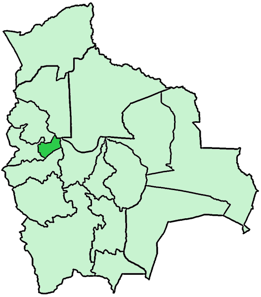 Mappa dell'arcidiocesi cattolica di La Paz, in Bolivia. Anno 2009.